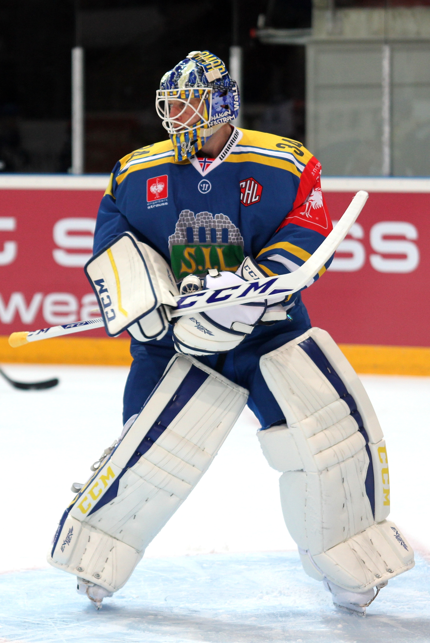 Robert Hestmann (H 34).